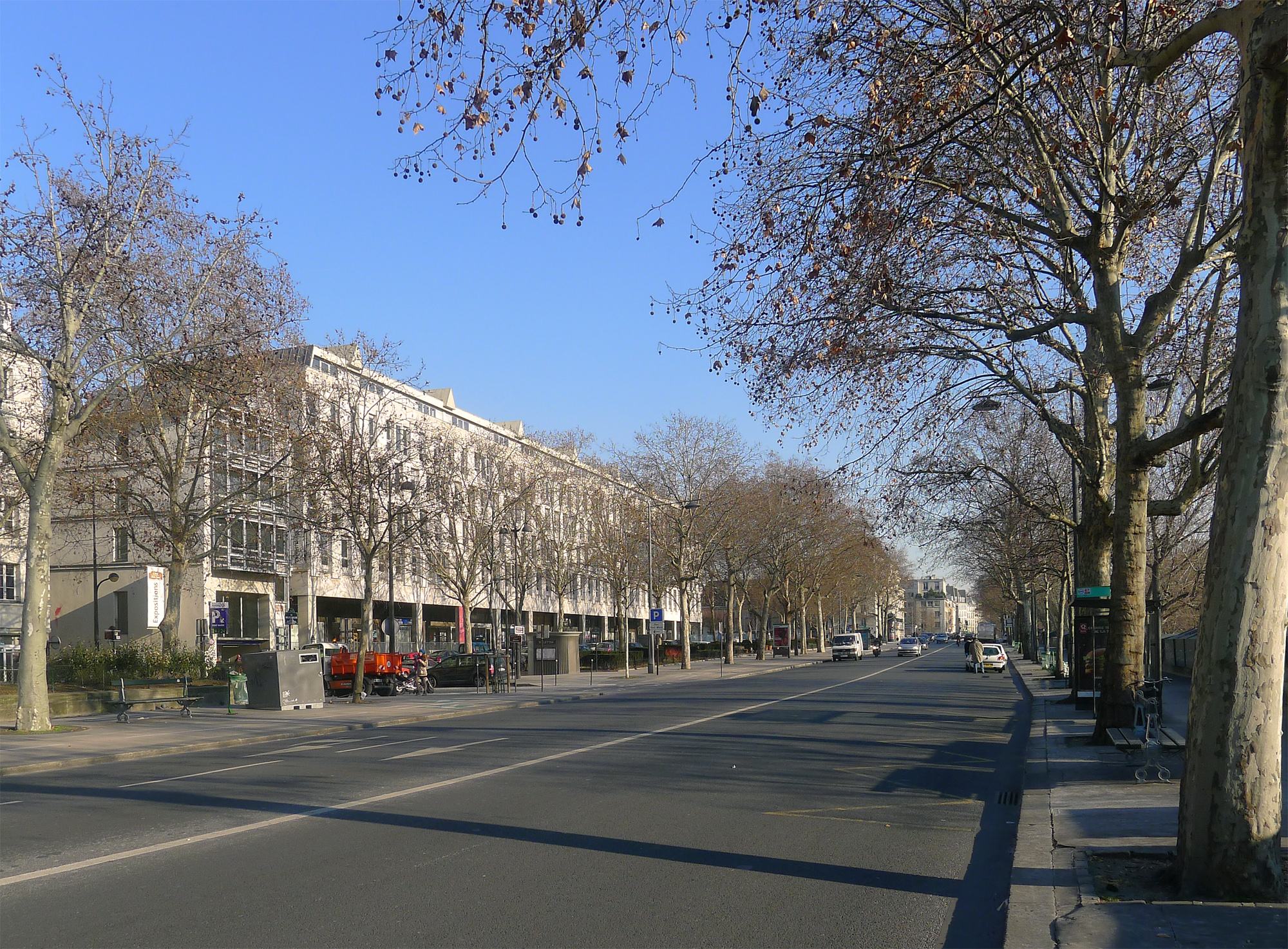 Quai de l'Hôtel-de-Ville au niveau de la Cité internationale des arts - Paris IV